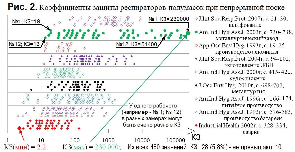 Средние коэффициенты защиты КЗ респираторов-полумасок, измеренные у разных рабочих в разных производственных условиях Файл содержит диаграмму, на которой маркерами отмечены результаты испытаний респираторов в производственных условиях - средние значения 480 ПКЗ. Респираторы использовались непрерывно.